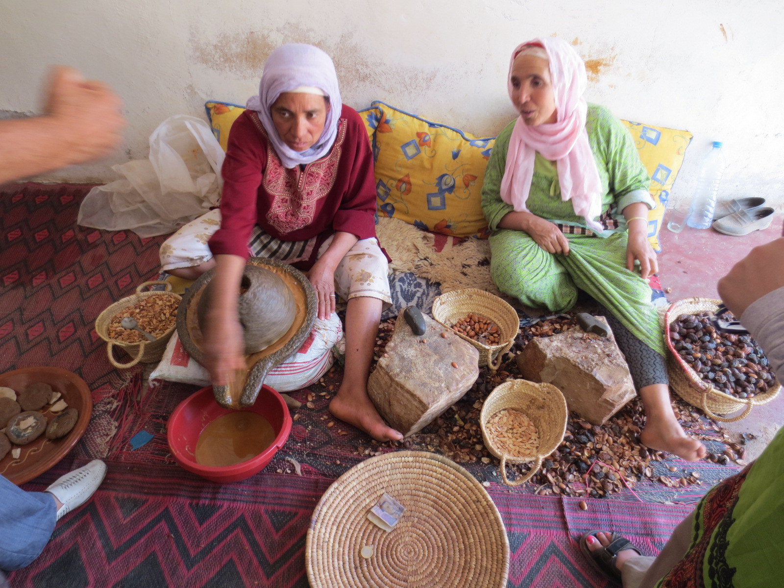 Production artisanale d'huile d'argan entre Marrakech et l'Atlas au Maroc